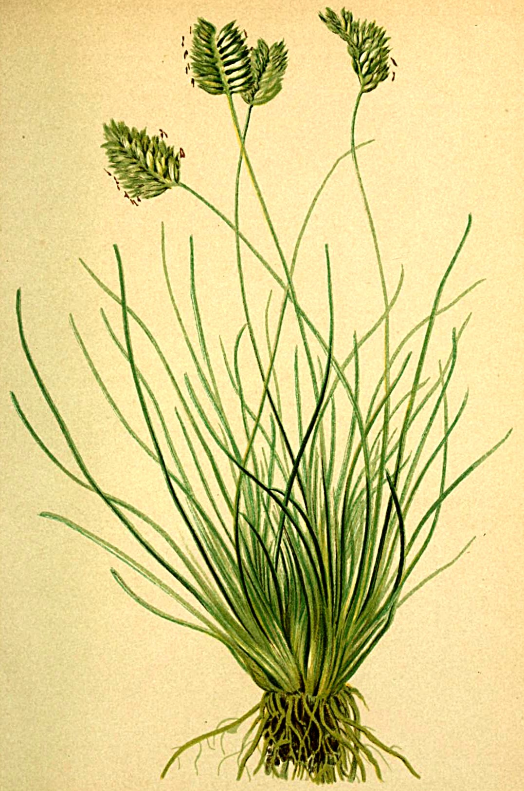 Sesleria disticha (Oreochloa disticha)